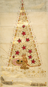 თურქული ხელნაწერი ხელნაწერთა ეროვნული ცენტრის აღმოსავლურ ხელნაწერთა ფონდიდან